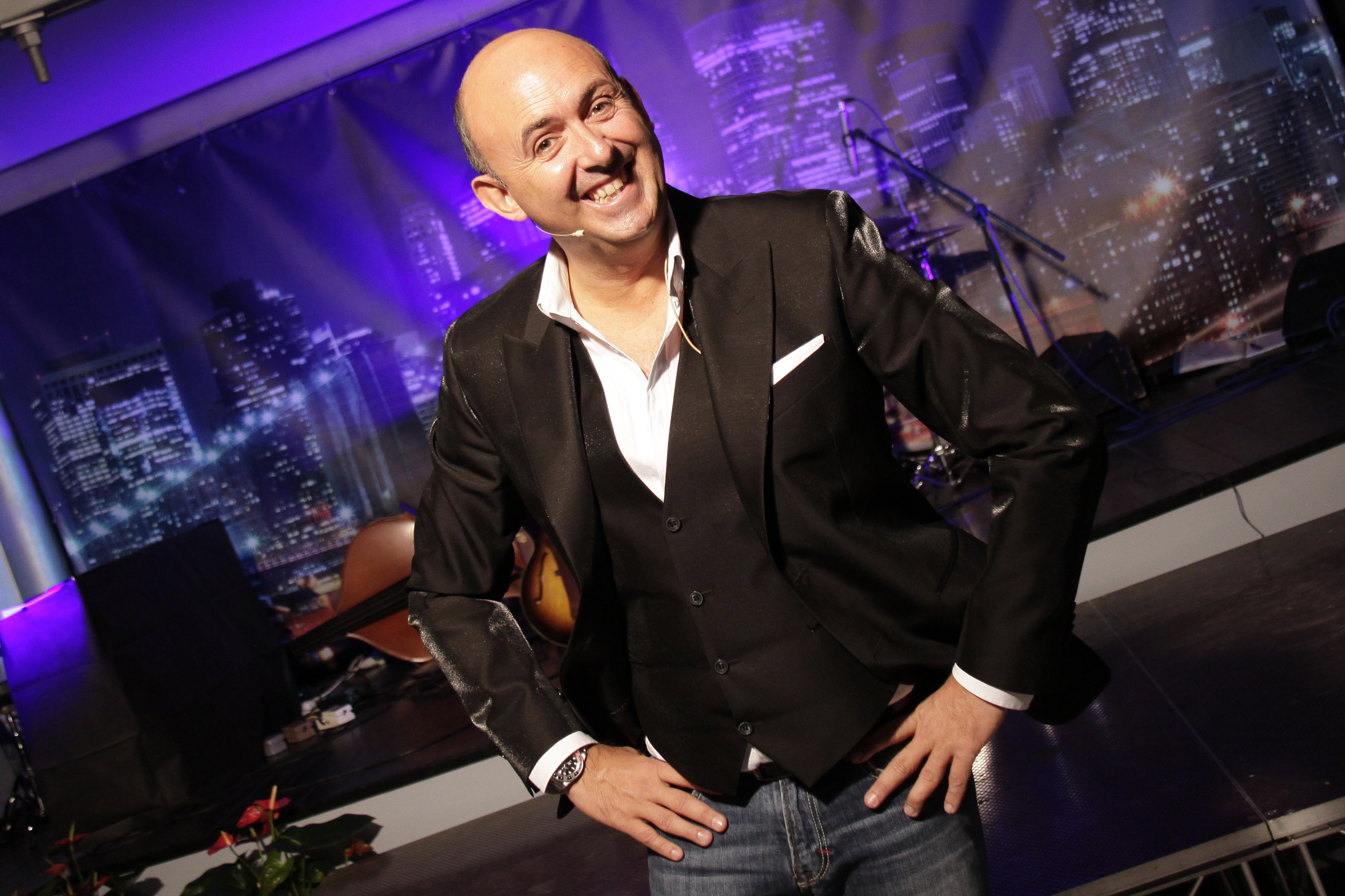 Sasà Salvaggio Show